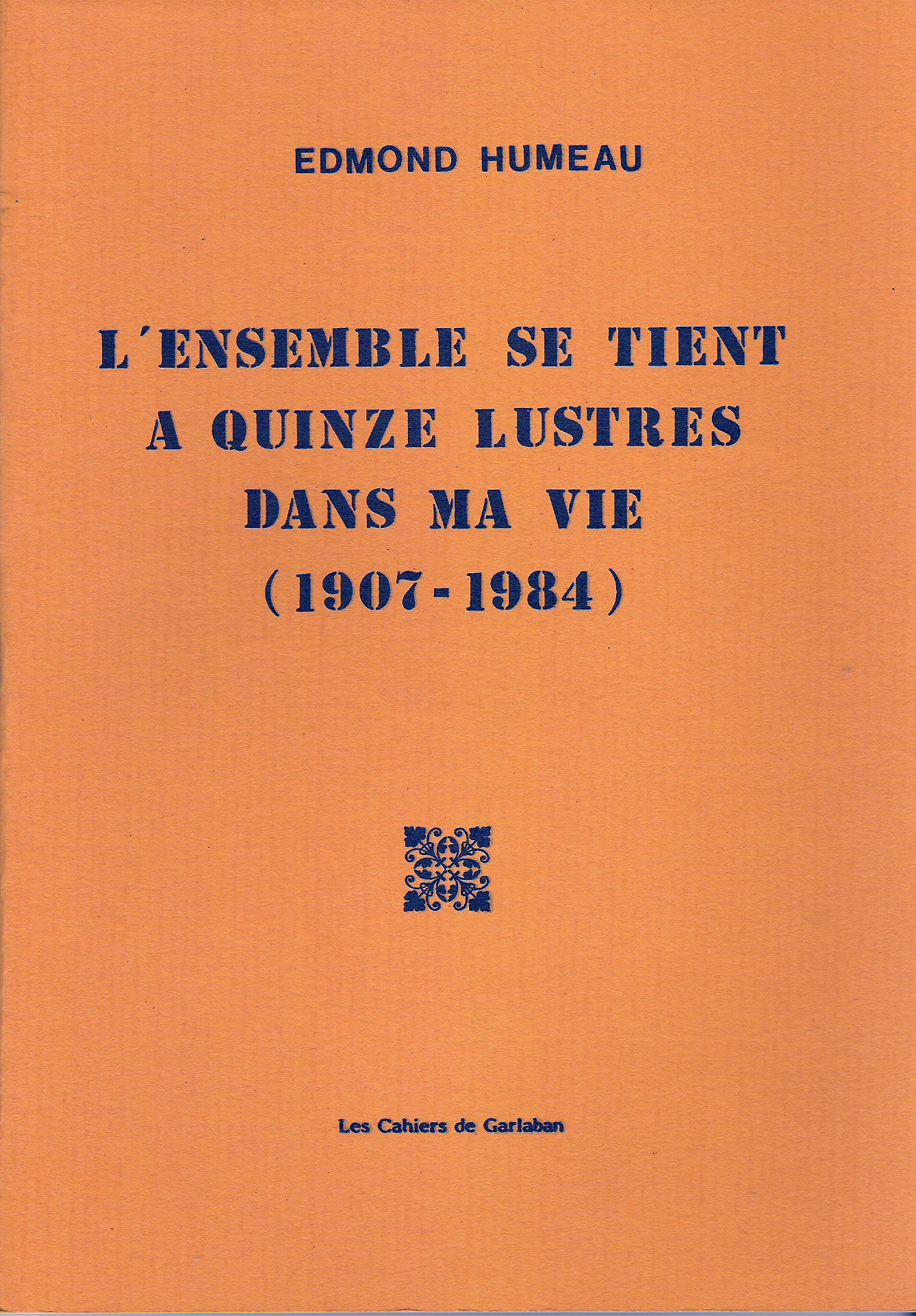 couverture d'un cahier de Garlaban